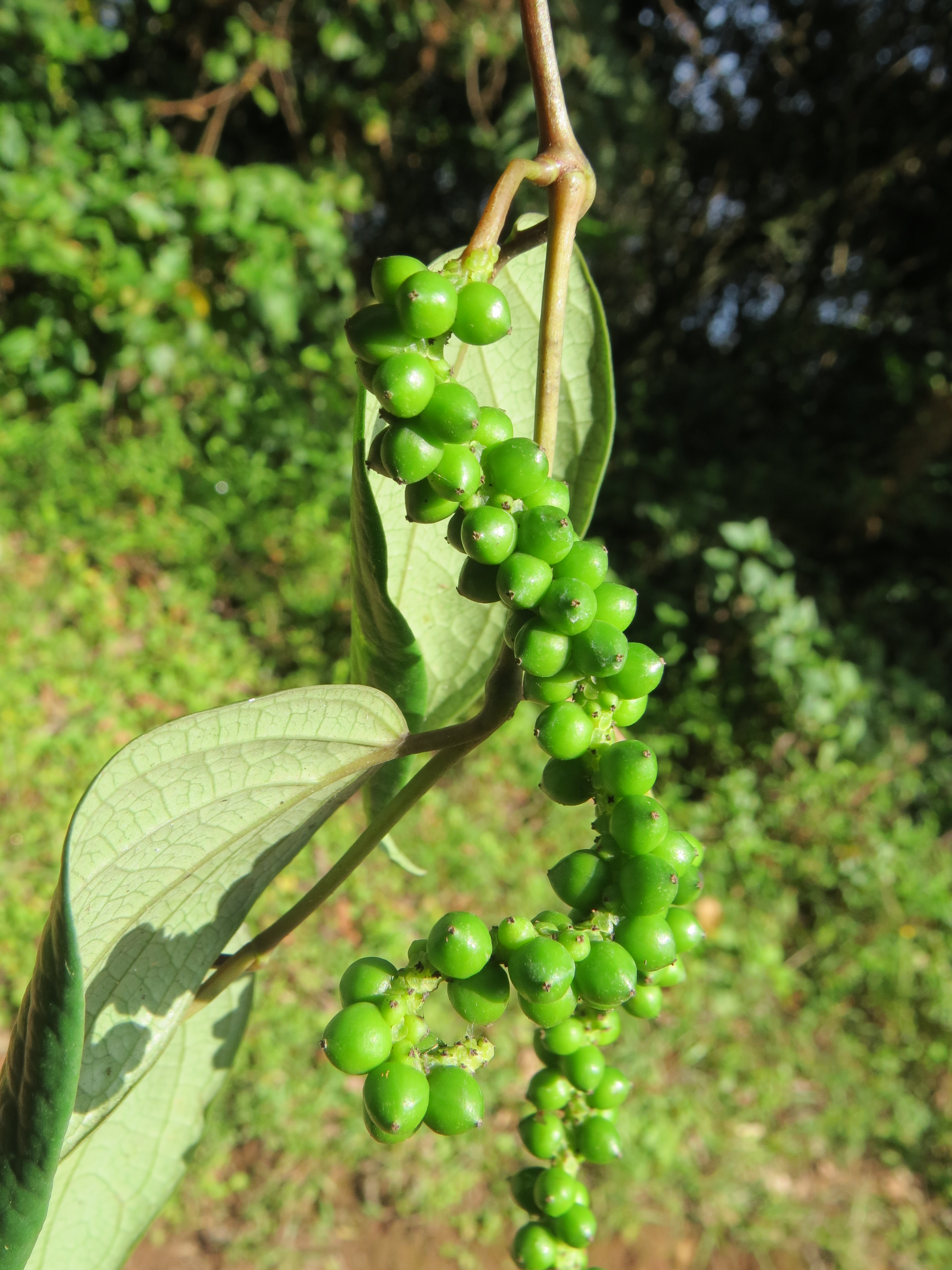 Photos taken at Mannavan Shola, Anamudi Shola National Park, Kerala during Munnar Butterfly Survey